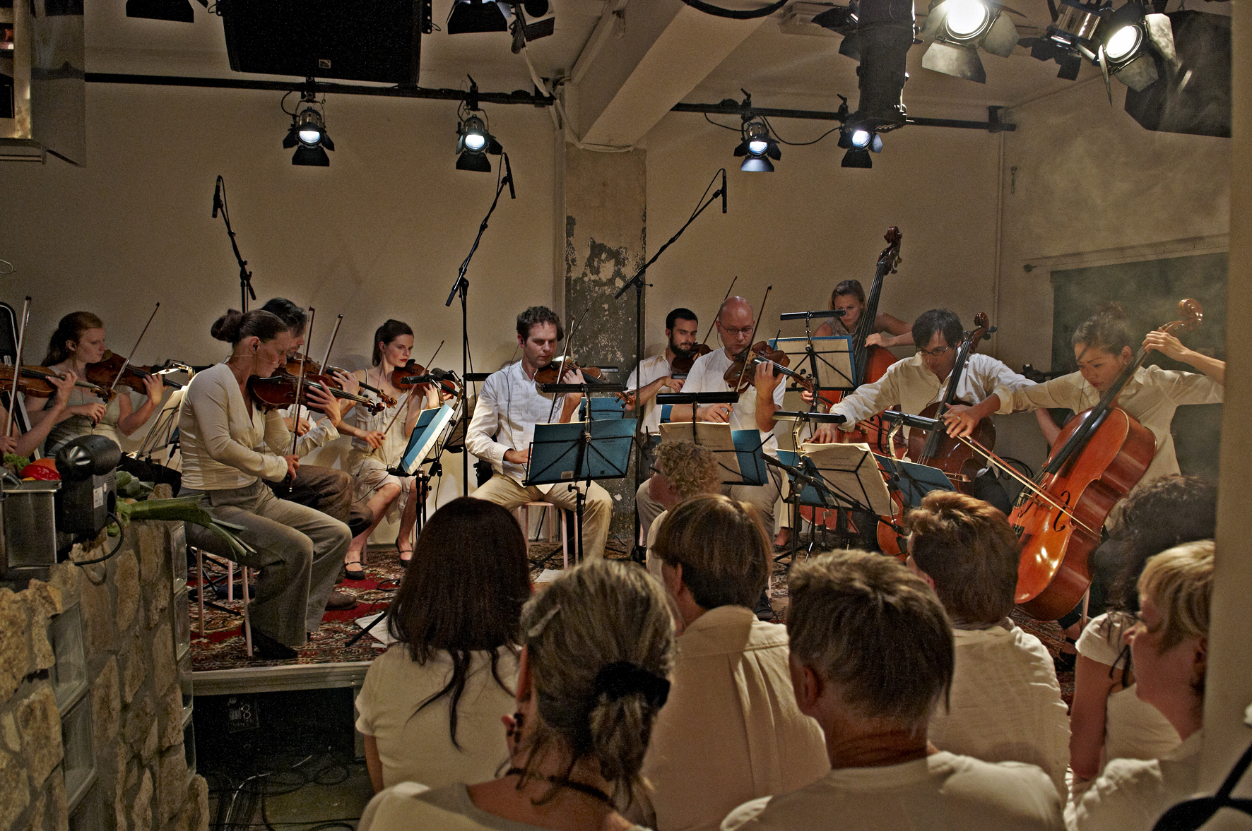 Ensemble Resonanz bei den Konspirativen Küchenkonzerten